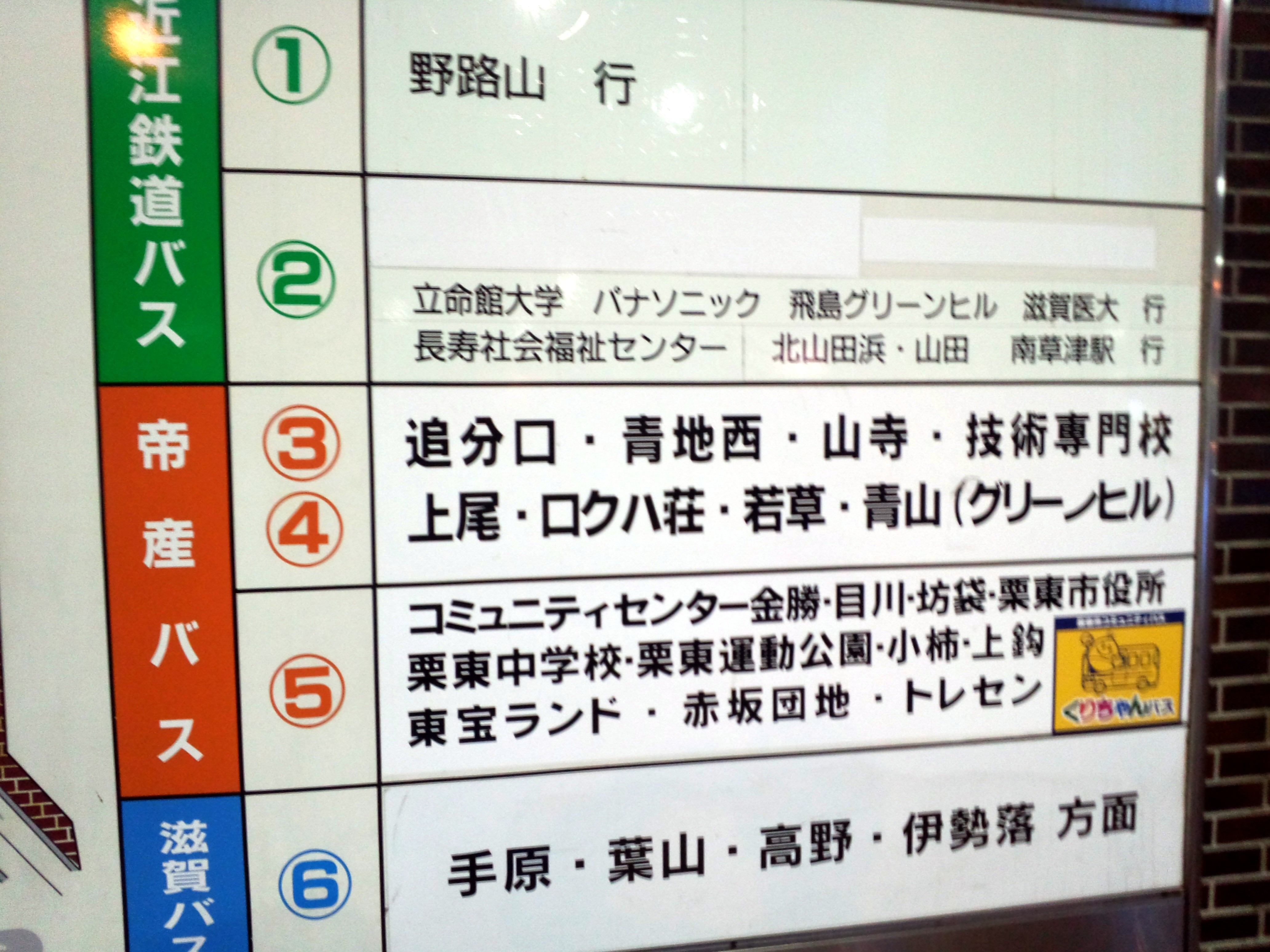 草津駅東口バスターミナルの看板